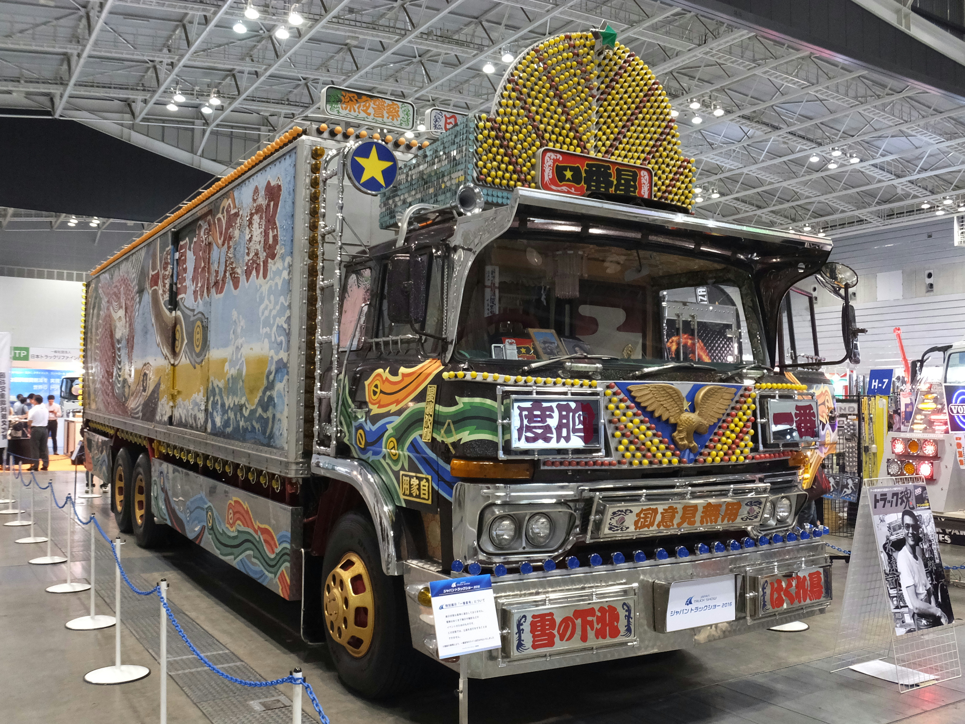 三菱ふそう・Tシリーズ, トラック野郎 一番星号（1作目の一番星号はT951型、2作目以降はFU型）（ジャパントラックショー2016出展車）